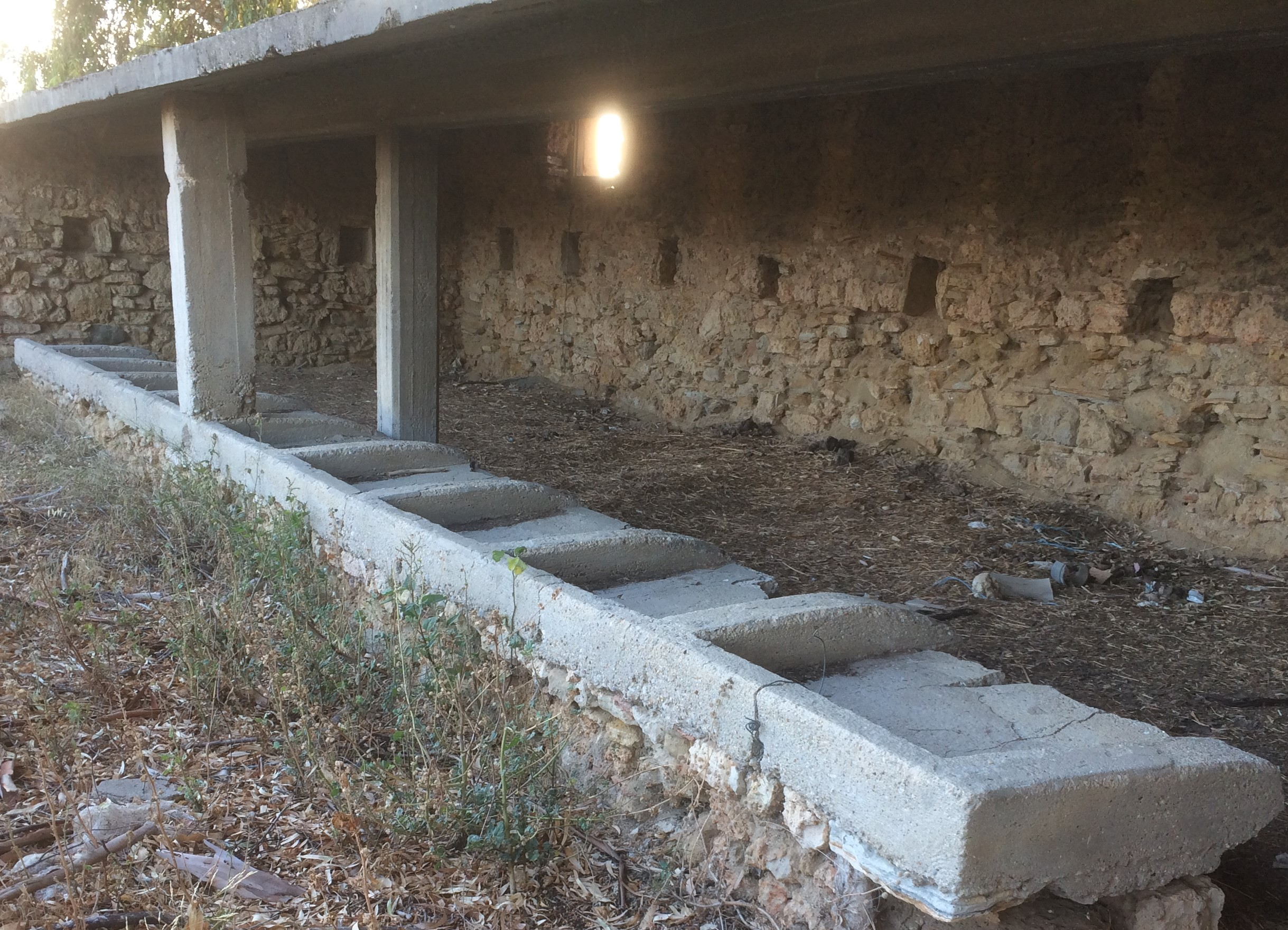 Κοινόχρηστο Πλυσταριό Αστερίου (Οψη 1)